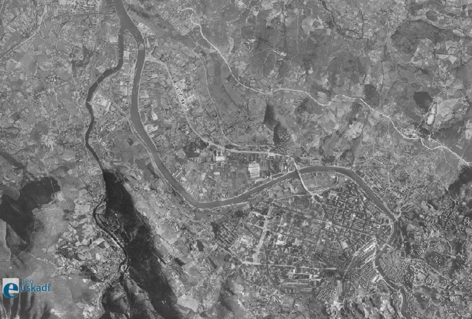 Zorrotzaurreko ortoargazkia, 1945-46an egina. Deustuko kanala eraiki gabe zegoen oraindik.